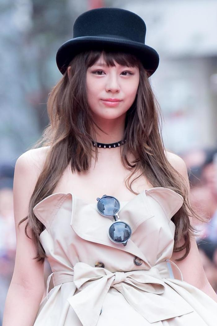 ファッションの祭典「第６回渋谷ファッションウイーク」の路上ファッションショーに出演した西内まりや